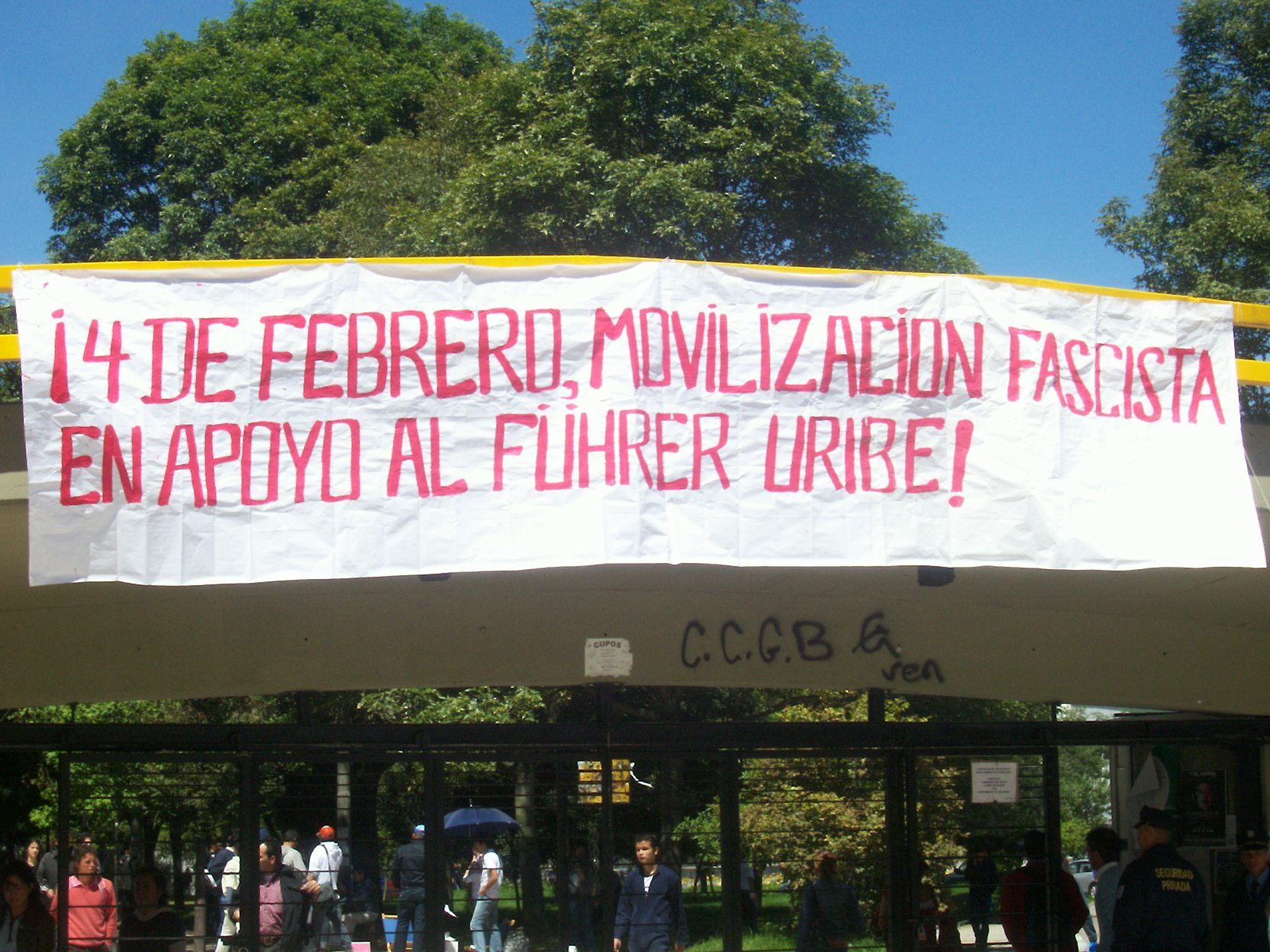 Cartel contra la marcha del 4 de febrero en la Universidad Nacional de Colombia, sede Bogotá